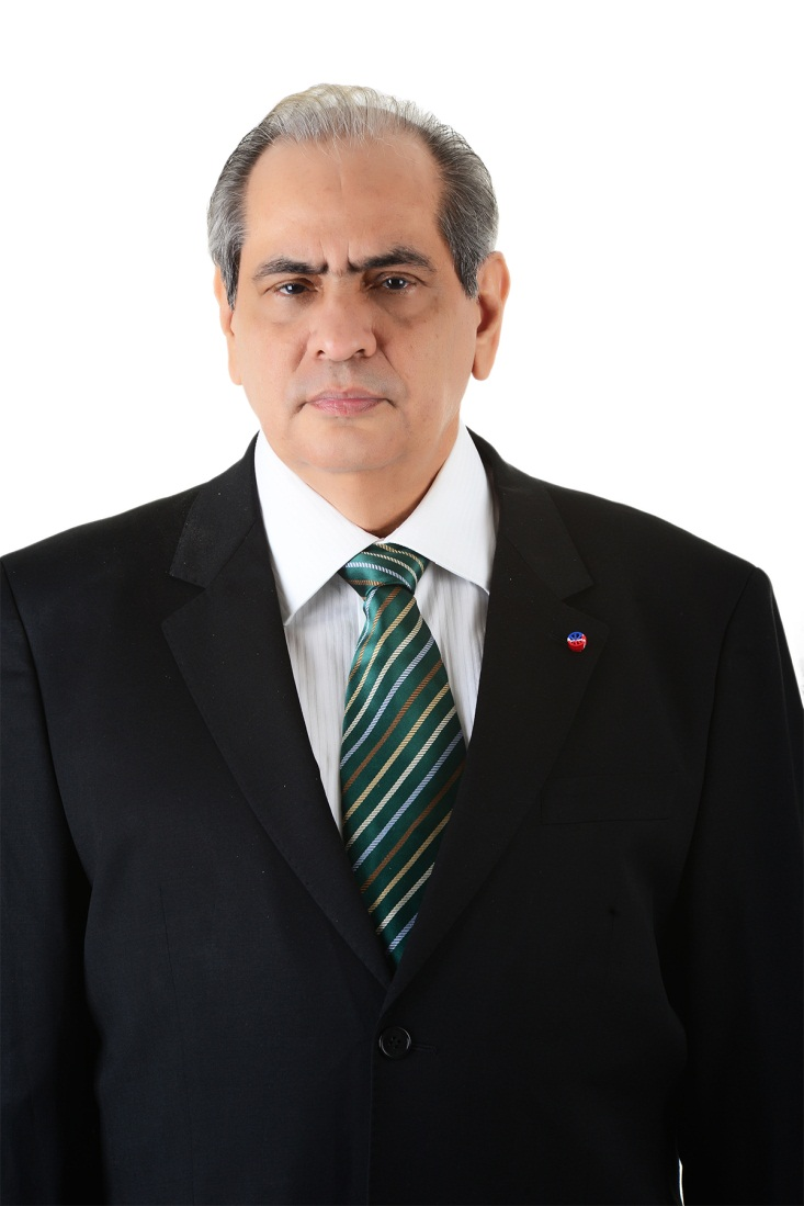 Cônsul Honorário da Grécia no Amazonas e presidente do Conselho Deliberativo do Sebrae Amazonas (CDE)